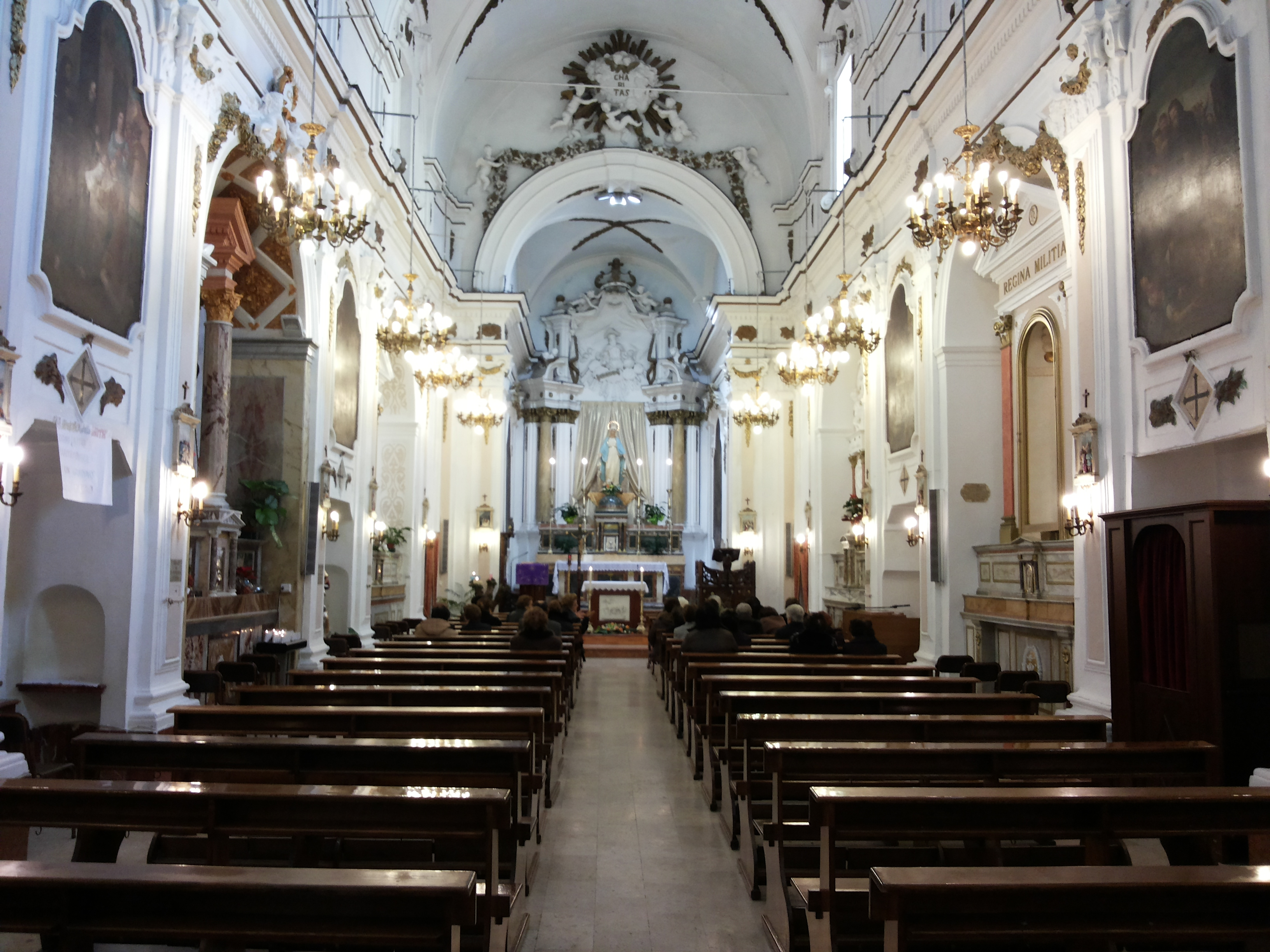 Interni della chiesa di San Francesco di Paola (Alcamo)